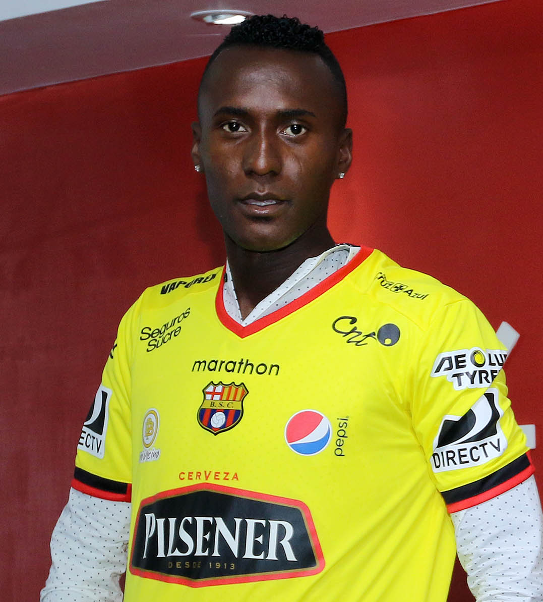 Guayaquil, miércoles 14 de diciembre del 2016 (Andes).-José Francisco Cevallos, presidente de Barcelona Sporting Club presentó nuevos refuerzos para la temporada 2017 del campeonato nacional de fútbol. En la gráfica el defensa Beder Caicedo . Foto:Andes/César Muñoz